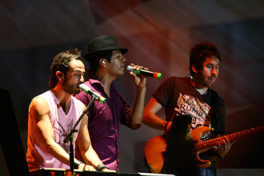 3er festival Musica Latina, Managua Julio 2007. Esta foto se tomó el 15 de julio, 2007 con una Canon EOS Digital Rebel XT. Imágen del grupo Camila. Esta foto se tomó el 15 de julio, 2007 con una Canon EOS Digital Rebel XT.